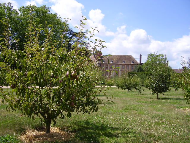 Vergers de Port-Royal-des-Champs